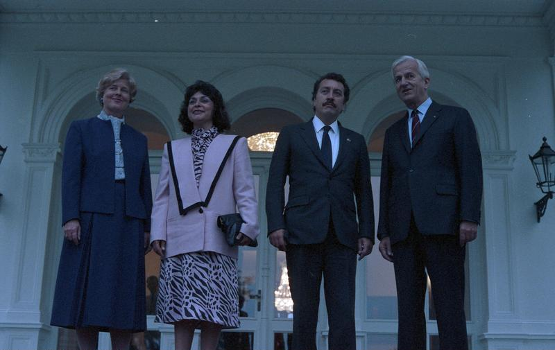 11.-15.10.1986 Besuch des Präsidenten von Guatemala, Lic. Marco Vinicio Cerezo Arévalo, und seiner Frau Lic. Raquel Blandon de Cerezo in der Bundesrepublik Deutschland. 11.10.1986- Begrüßung mit militärischen Ehren durch Bundespräsident Richard von Weizsäcker vor dem Bundespräsidialamt.